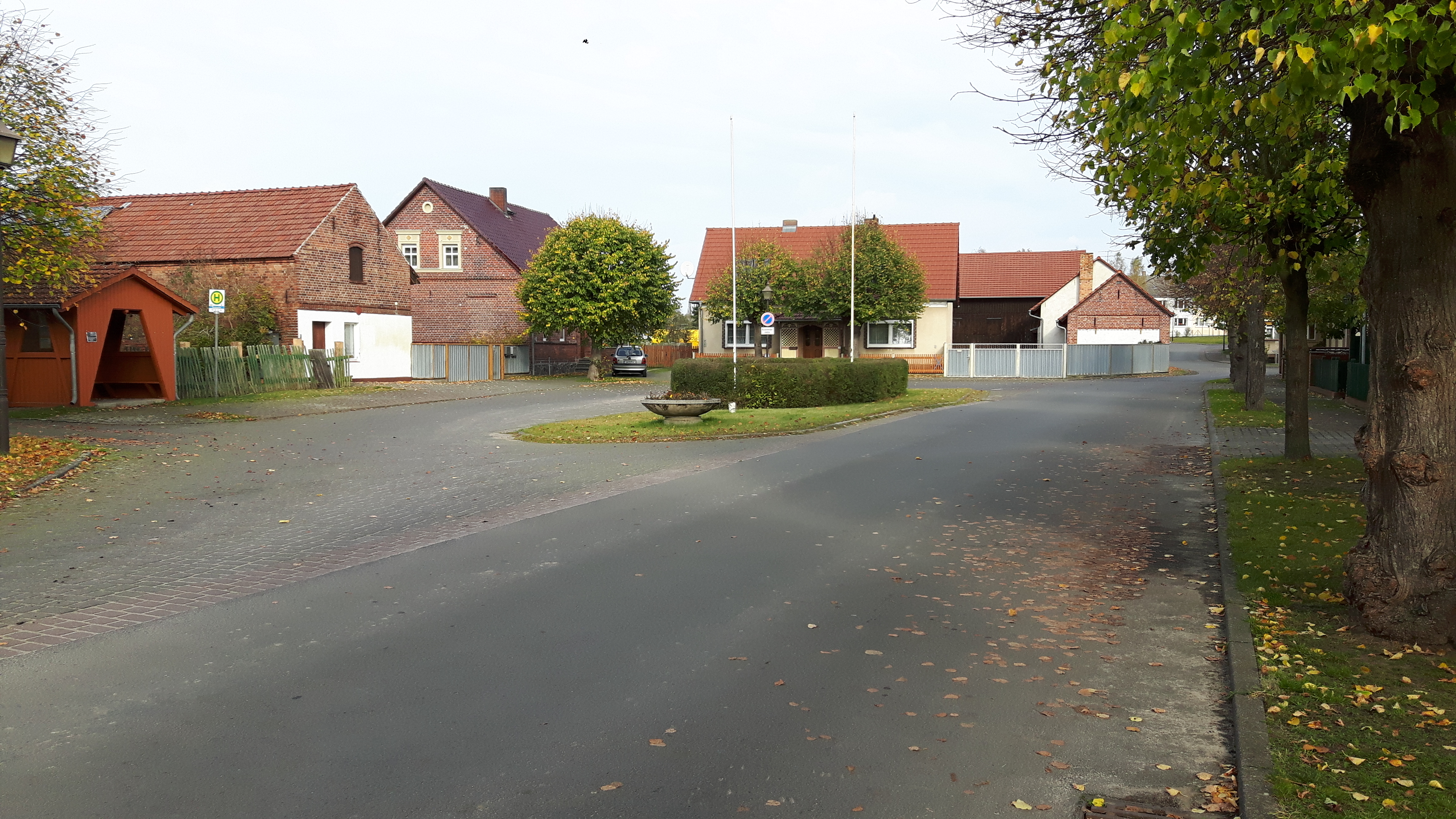 Buswendeschleife in der Dorfmitte von Jessern.